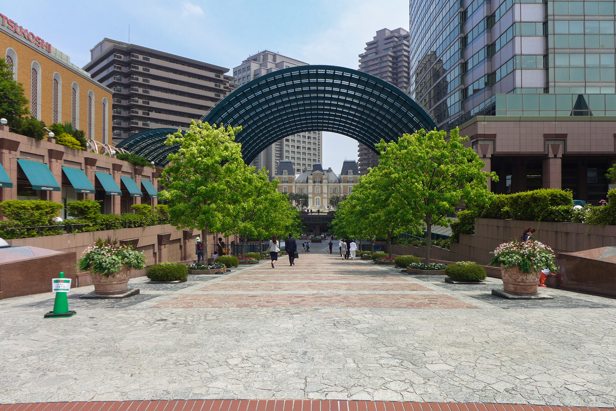 Ebisu Garden Place Square